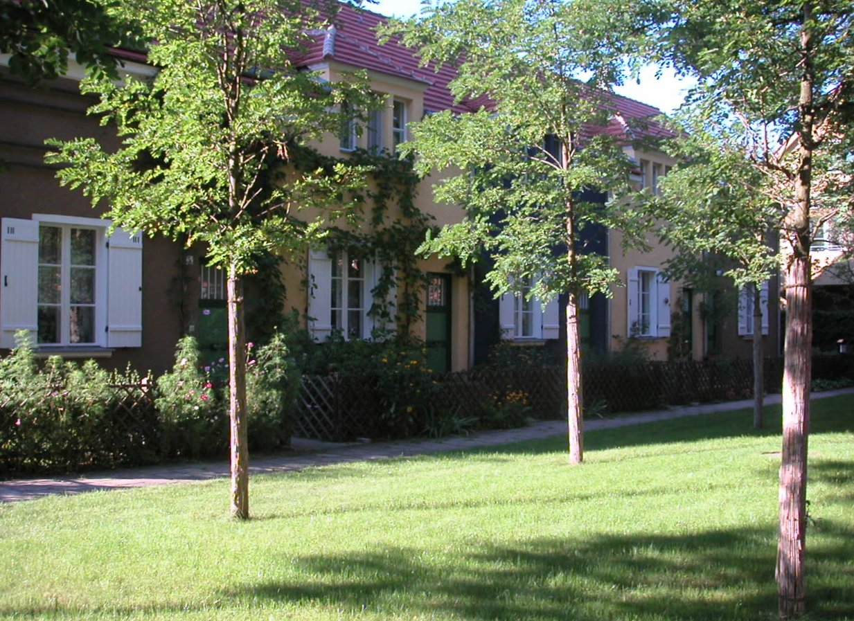 Tuschkastensiedlung, Akazienhof, Berlin-Bohnsdorf